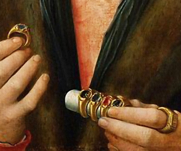 Кольца. Фрагмент "Портрета ювелира" Герарда Давида